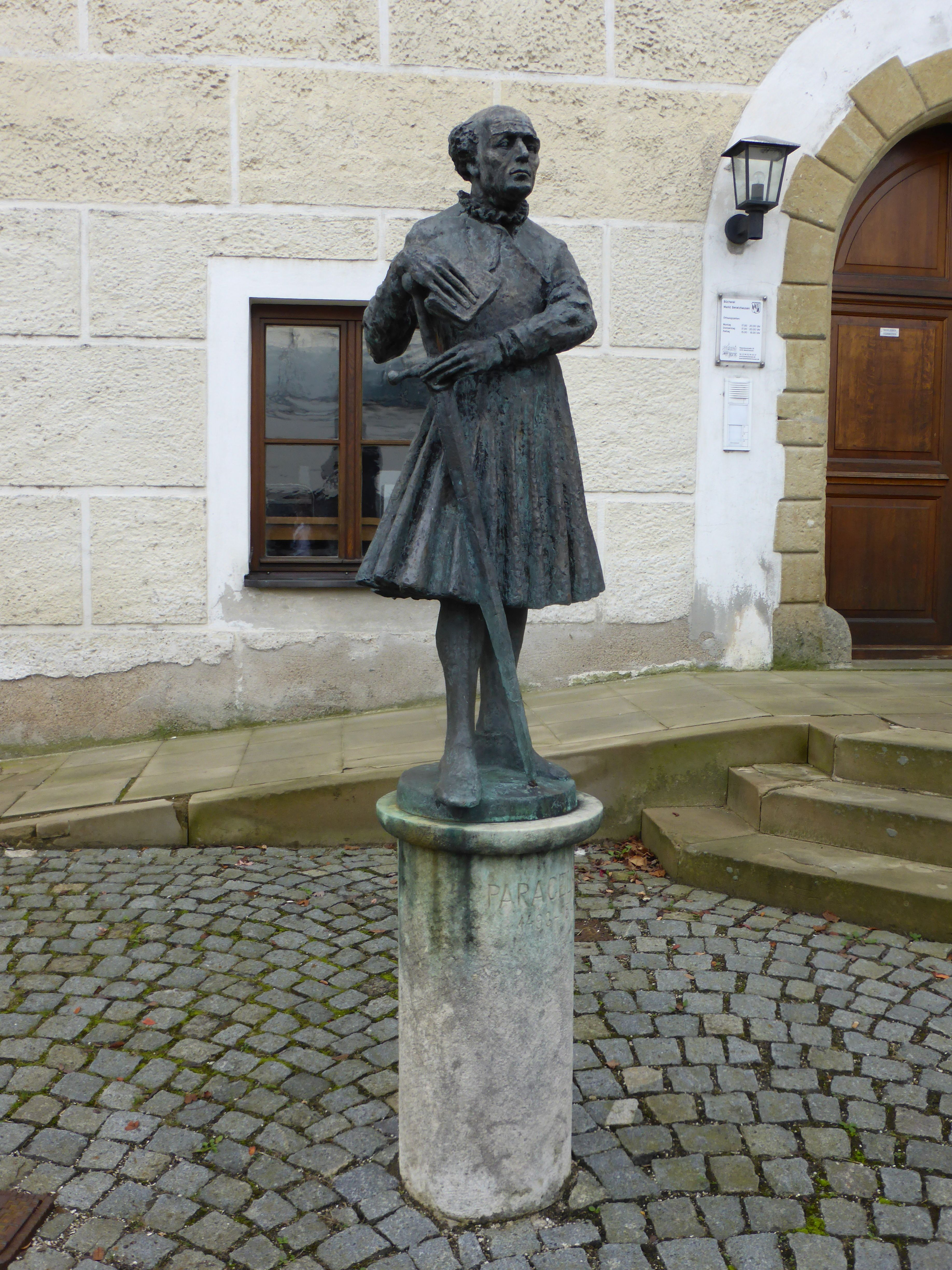 Paracelsus Denkmal Ehemaliger Zehentstadel (Beratzhausen)